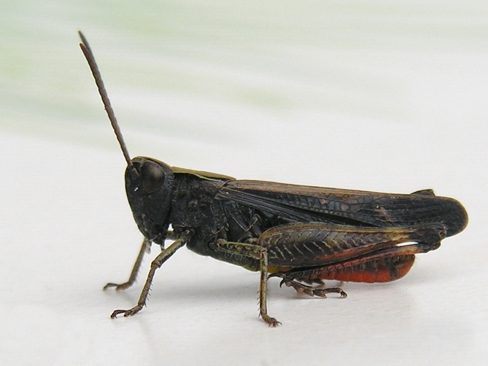 Saltón, Omocestus rufipes (Zetterstedt, 1821), Bastavales, Brión, Galiza